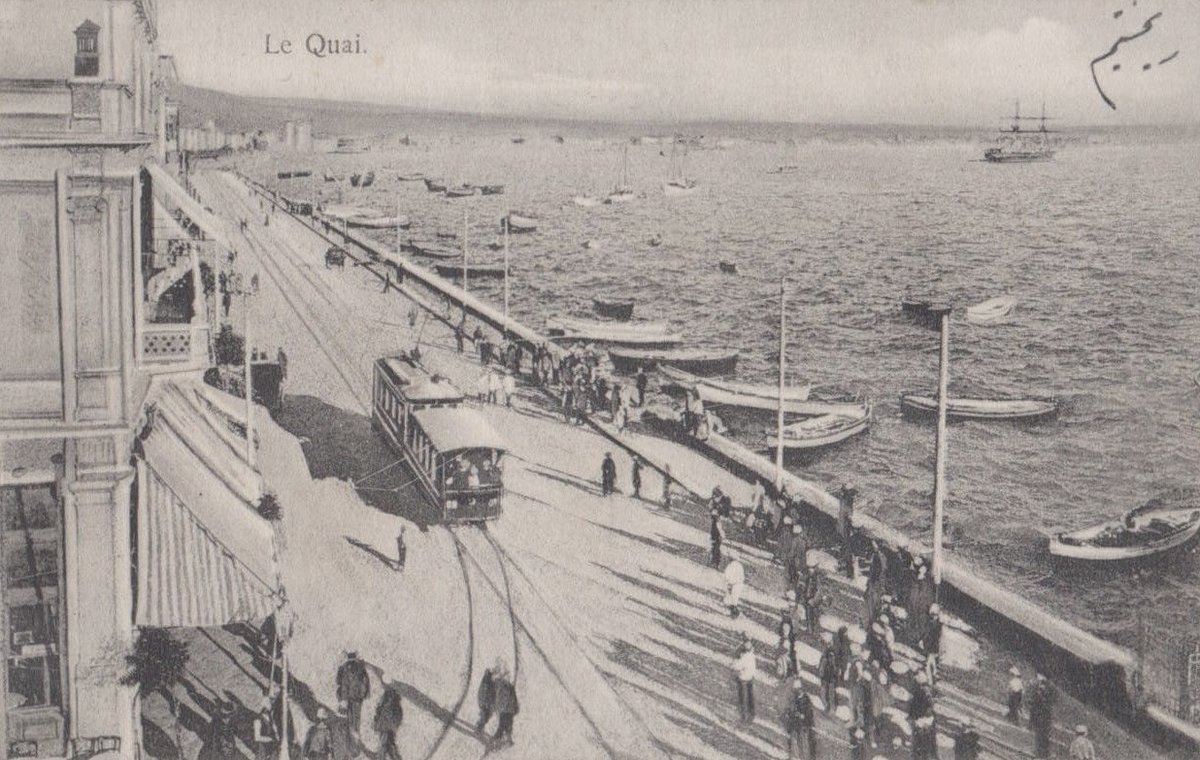 İzmir 1910